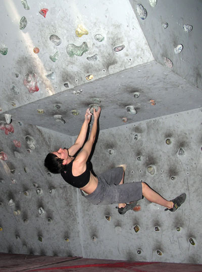 Buldering w okapie na sztucznej ścianie.